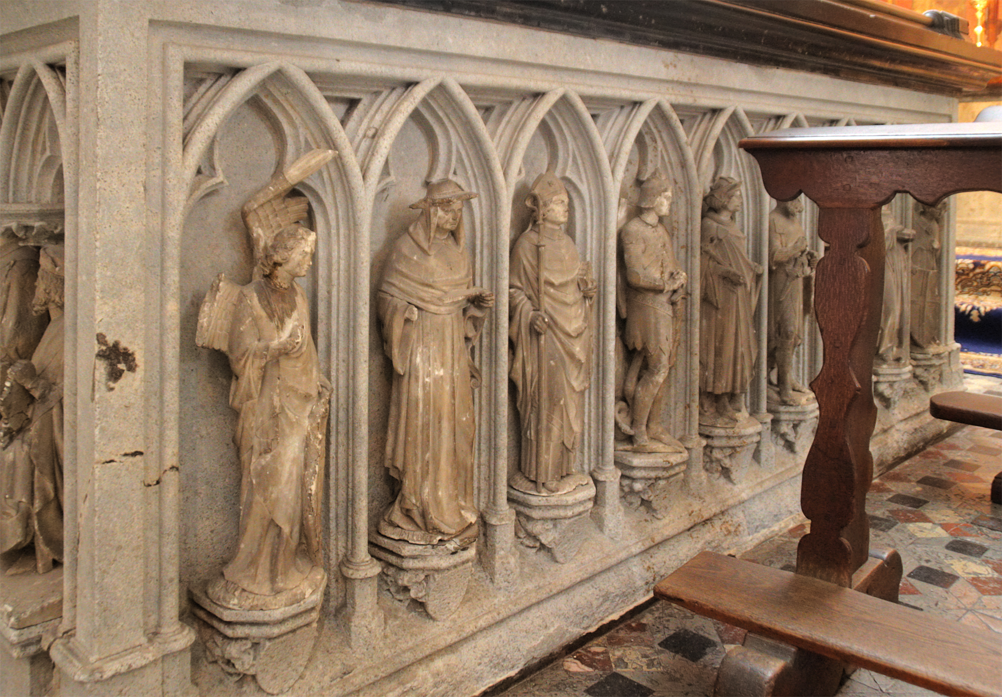 Hochgrab des Erzbischofs Konrad von Hochstaden in der Johanneskapelle des Kölner Doms